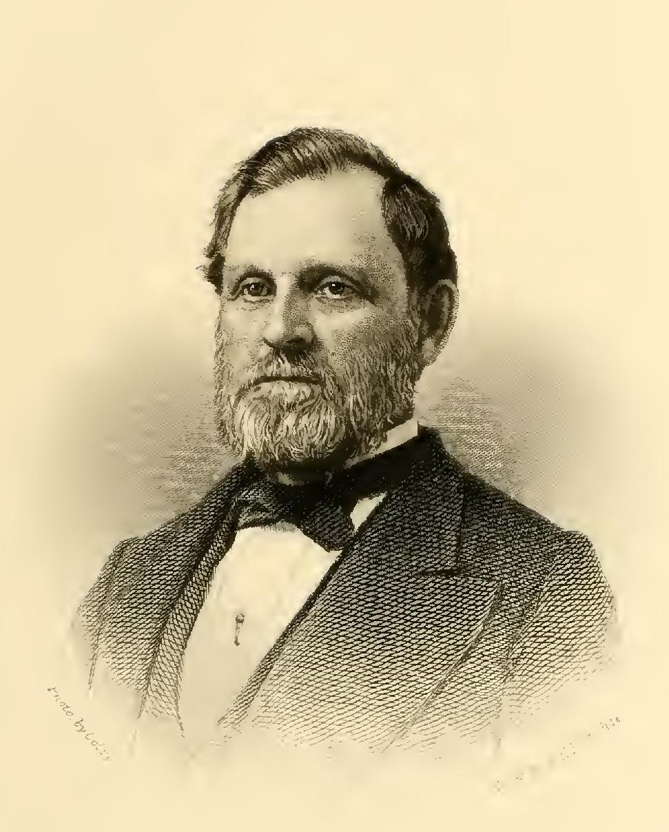 Aretas Blood